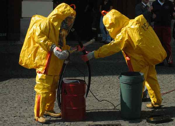 Wiener Berufsfeuerwehr bei Schadstoffeinsatz (gestellte Szene)